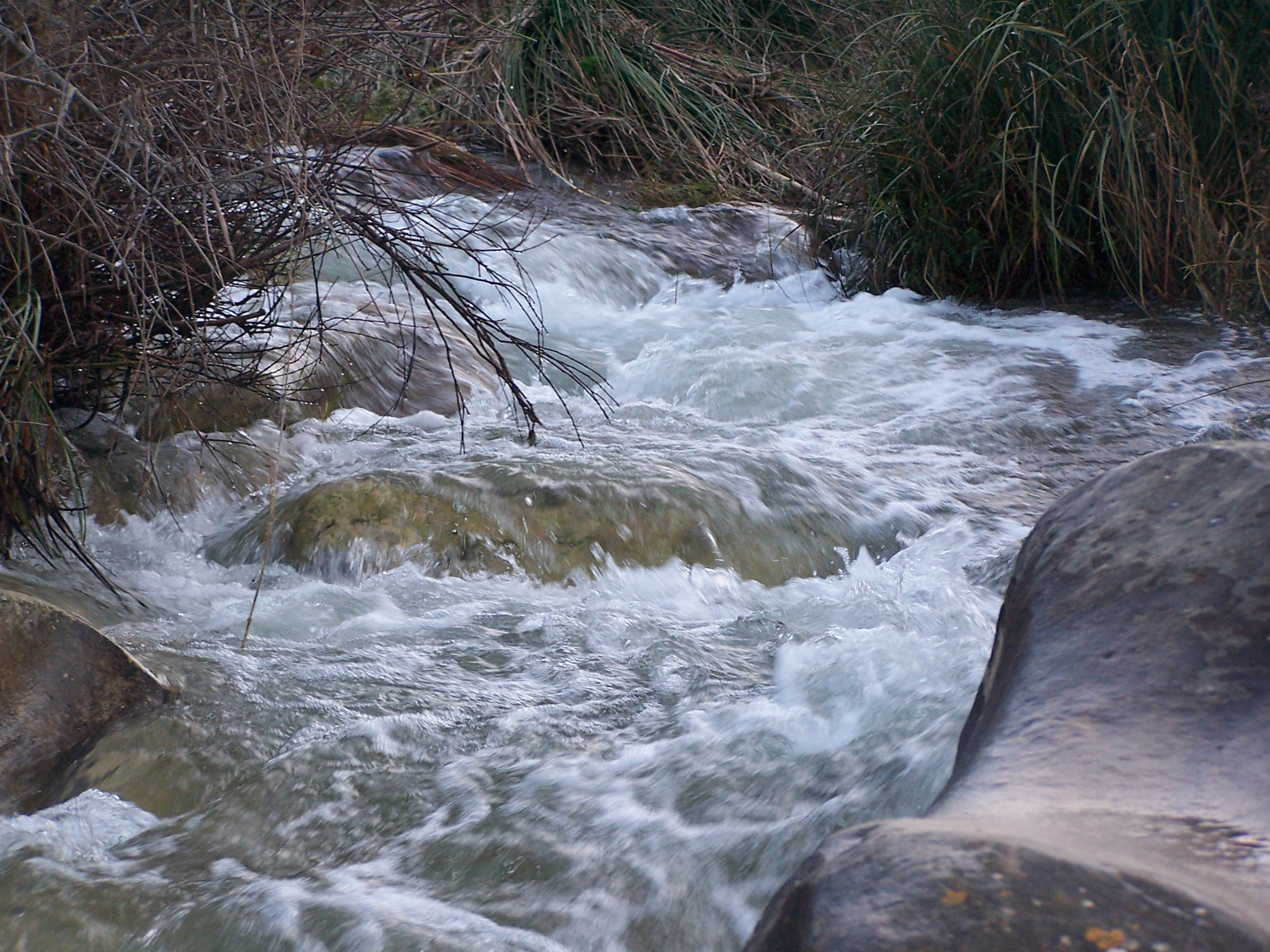 El río a su paso por Arens de Lledó